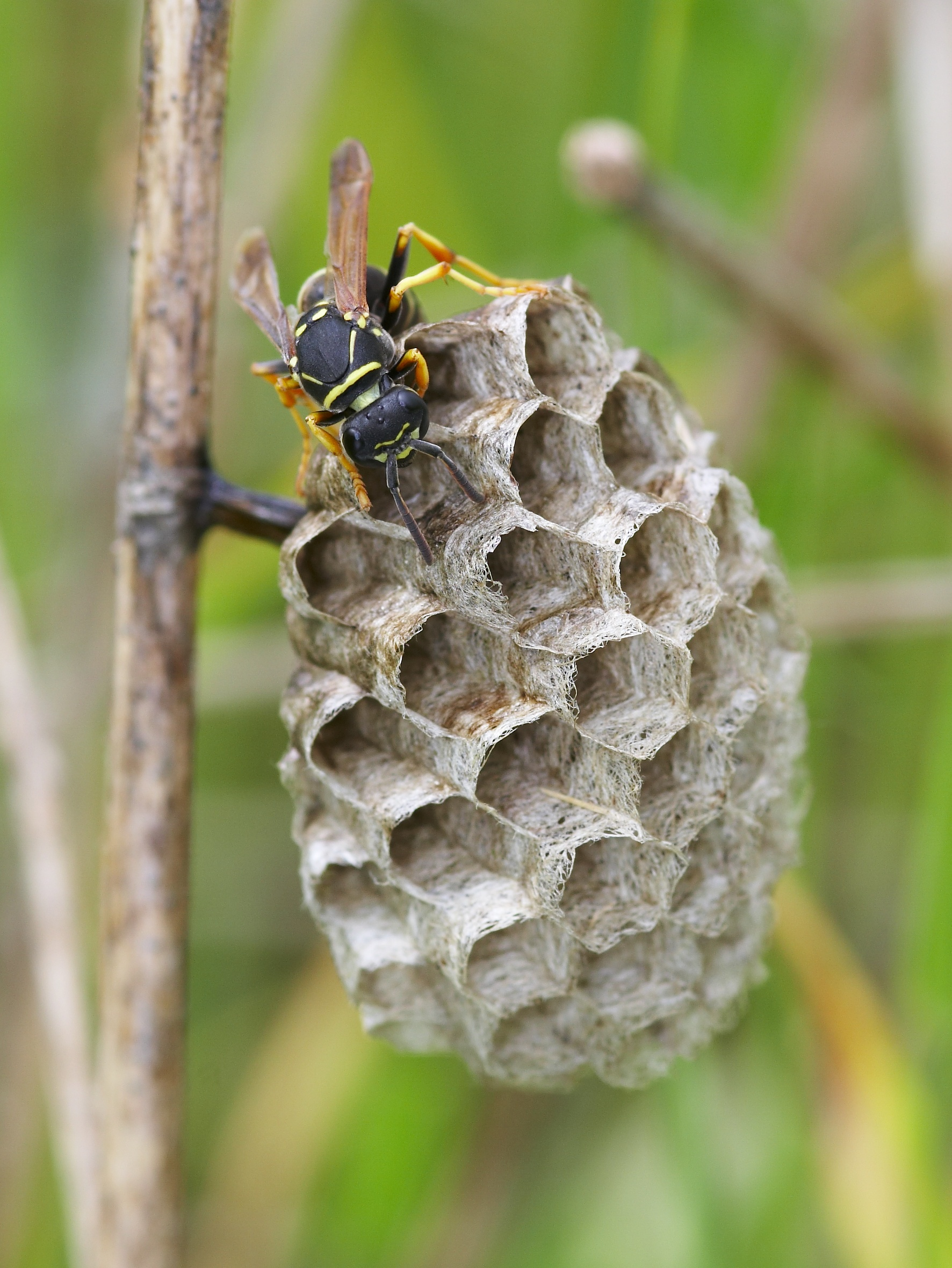 Polistes biglumis bimaculatus ♀ on it's nest